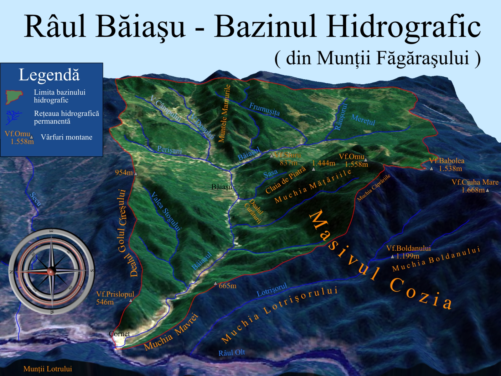 Harta 3D pentru bazinul Râului Băiașu, afluent al Oltului. Selectați alte bazine hidrografice adiacente ale Defileului Oltului, menționate pe hartă în mod senzitiv cu chenare de note informative.